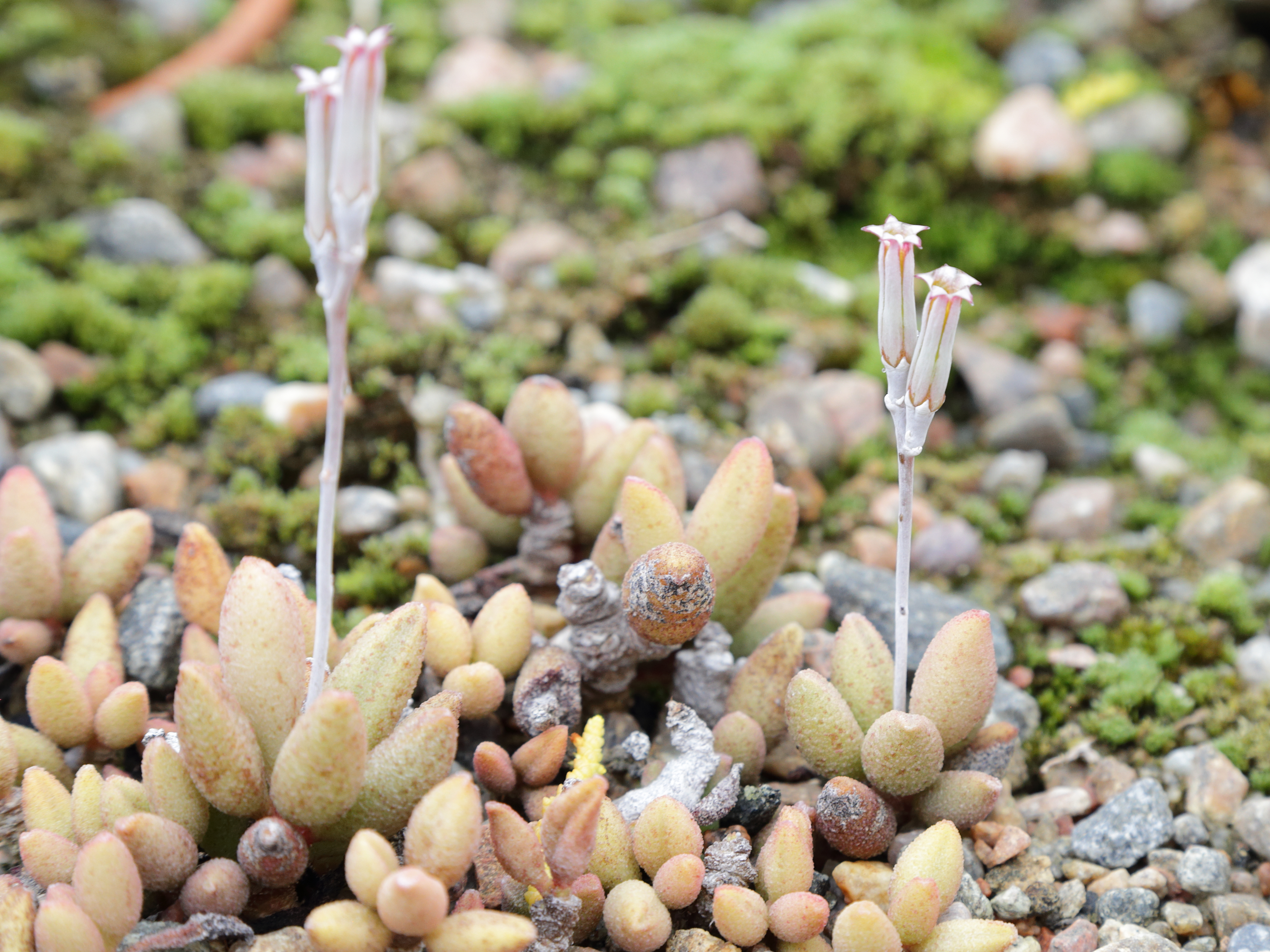 Adromischus marianae i Göteborgs botaniska trädgård.